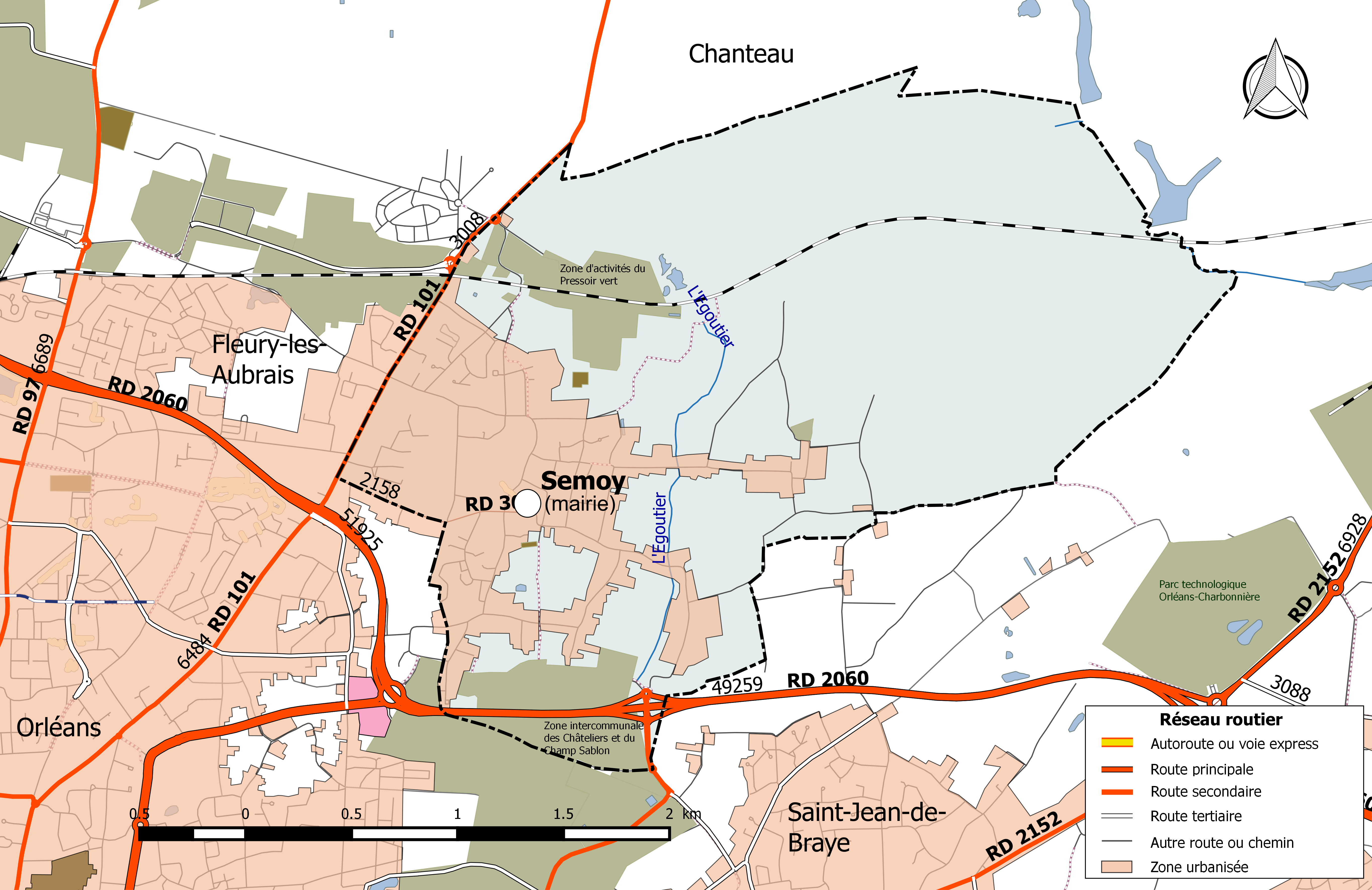 Carte du réseau routier de la commune de Semoy (Loiret).